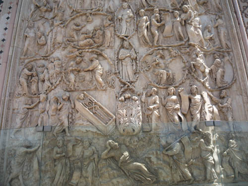 Рельеф на стене Дуомо в Орвието